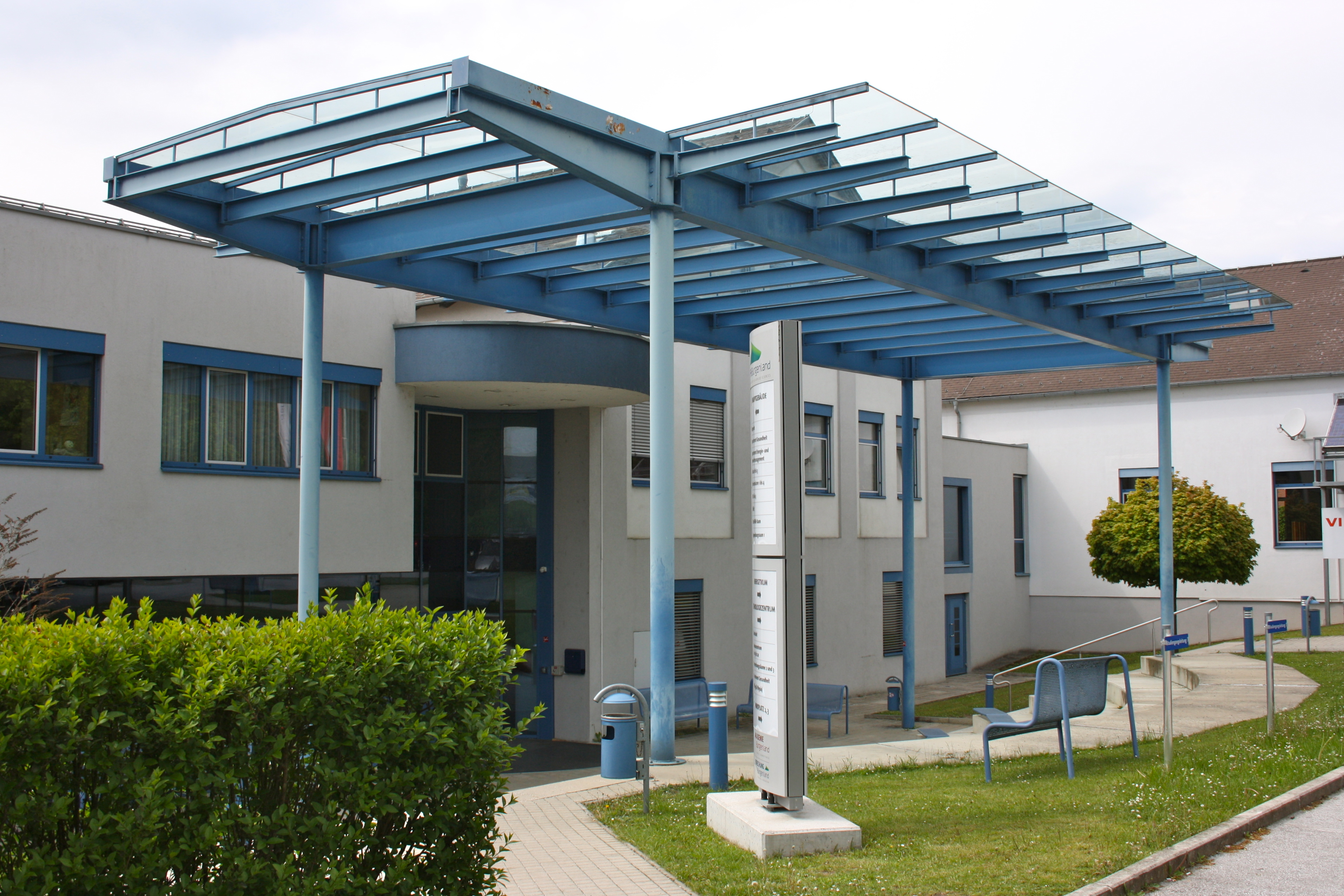 FH Burgenland in Pinkafeld.